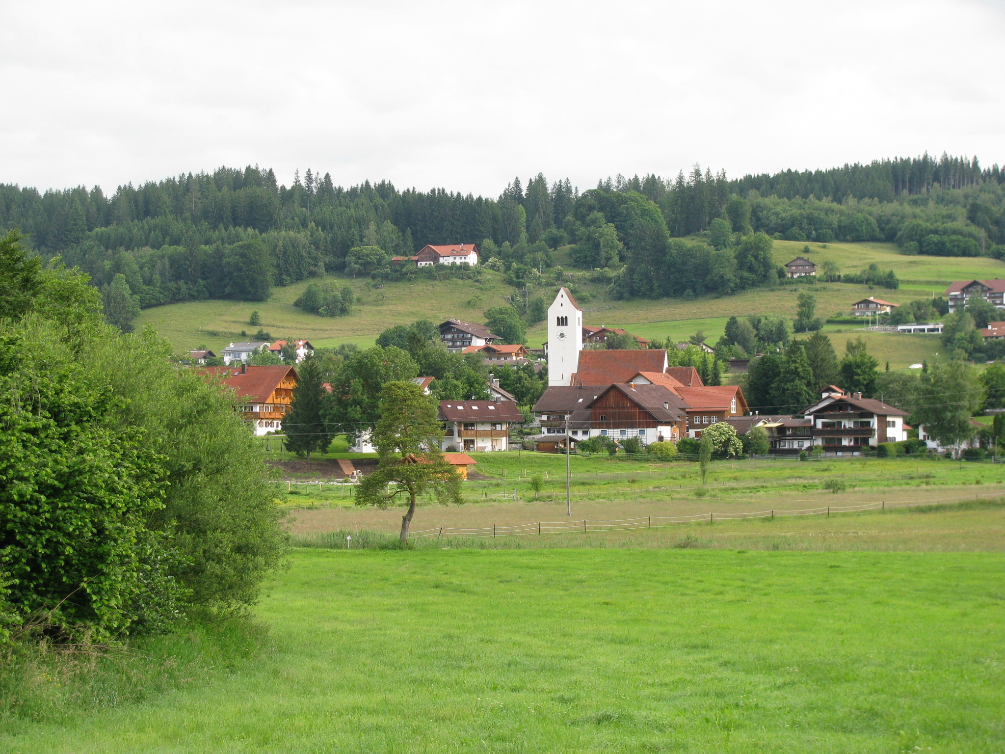 Hopfen am See, Stadt Füssen, Landkreis Ostallgäu, Bayern; Ansicht von Süden